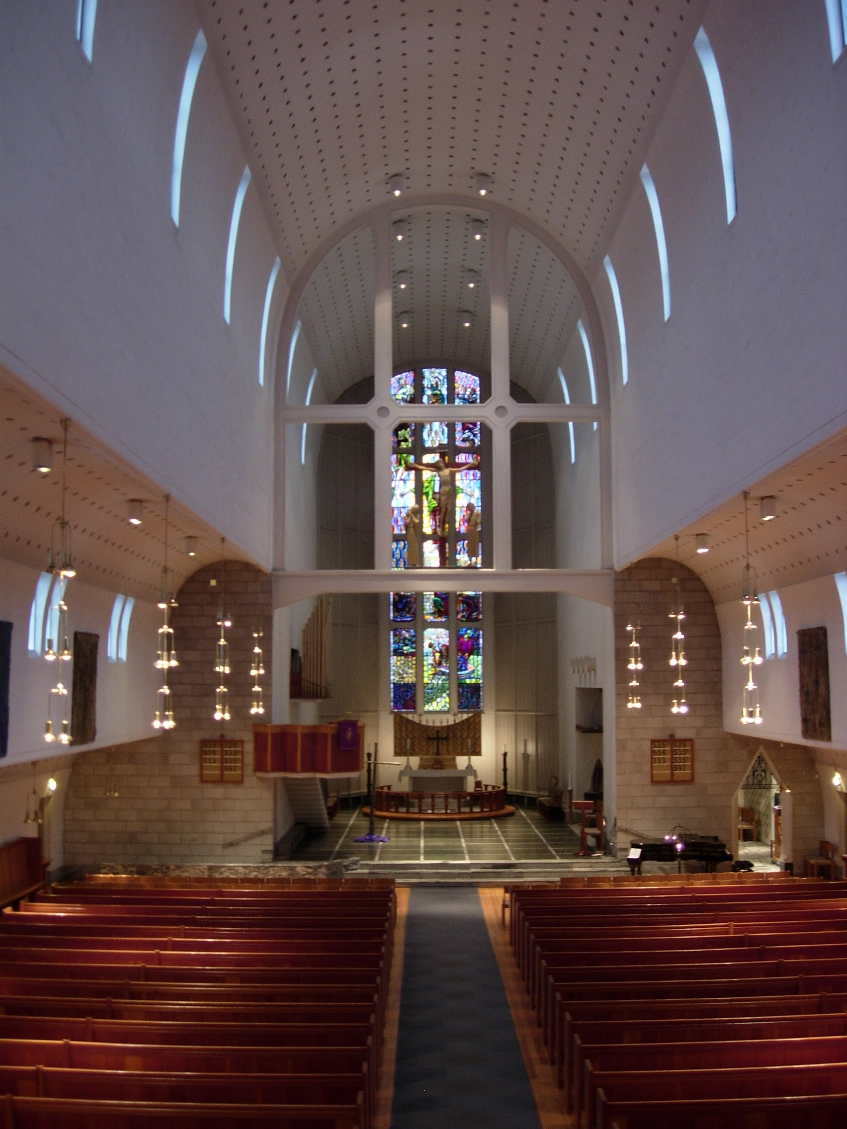 Bodø domkirke mot alteret